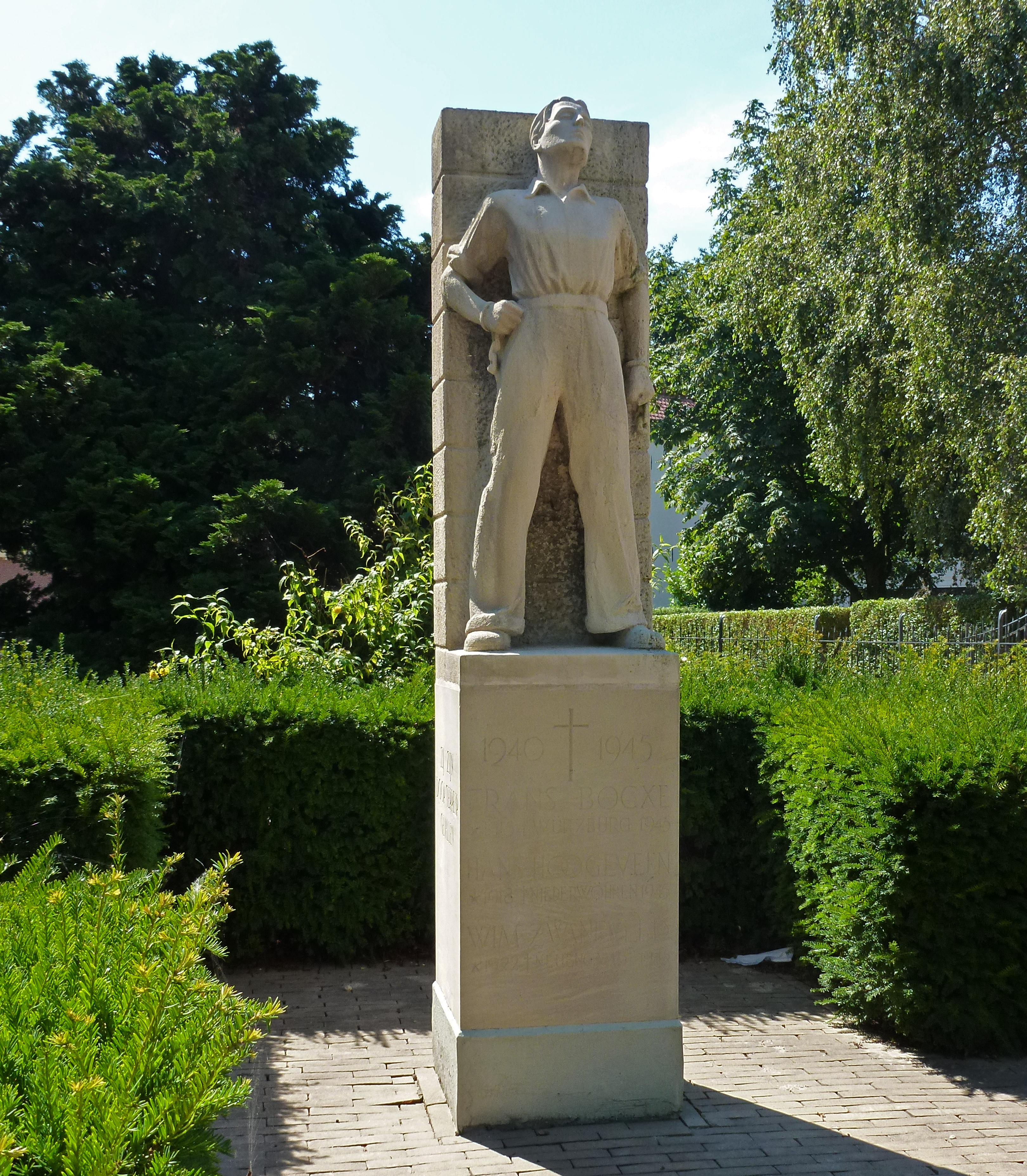 Verzetsmonument bij de Remonstrantse kerk aan de Dorpsstraat in Aarlanderveen. Gemeente Alphen aan de Rijn. Ontwerper is Ad Slinger Tekst op beeld: Gedenk hen, zij zijn door terreur gevallen 1940-1945 Frans Bocxe 1915 Würzburg 1946 Hans Hoogeveen 1918 Niederwöhren 1945 Wim Zwaneveld 1922 Neuengamme 1945